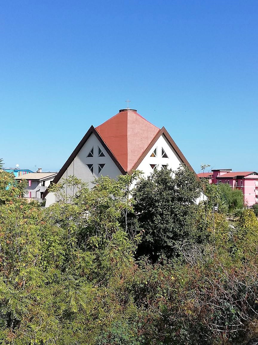 Veduta da mezzogiorno, copertura Longano.